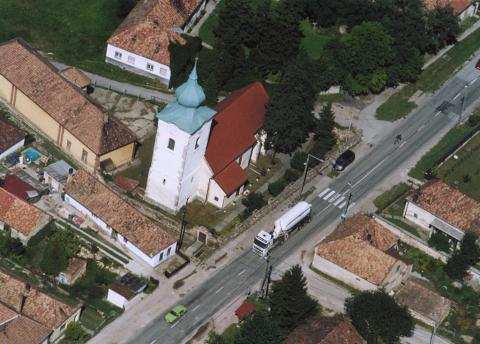 Neszmély Hungary aerialphotography